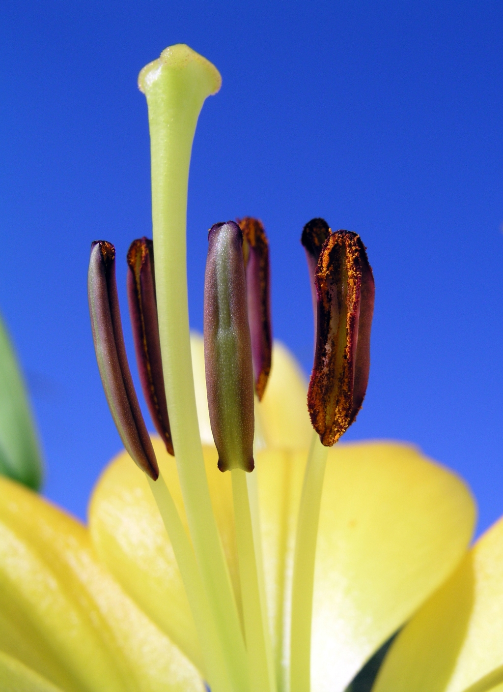 Ljiljan